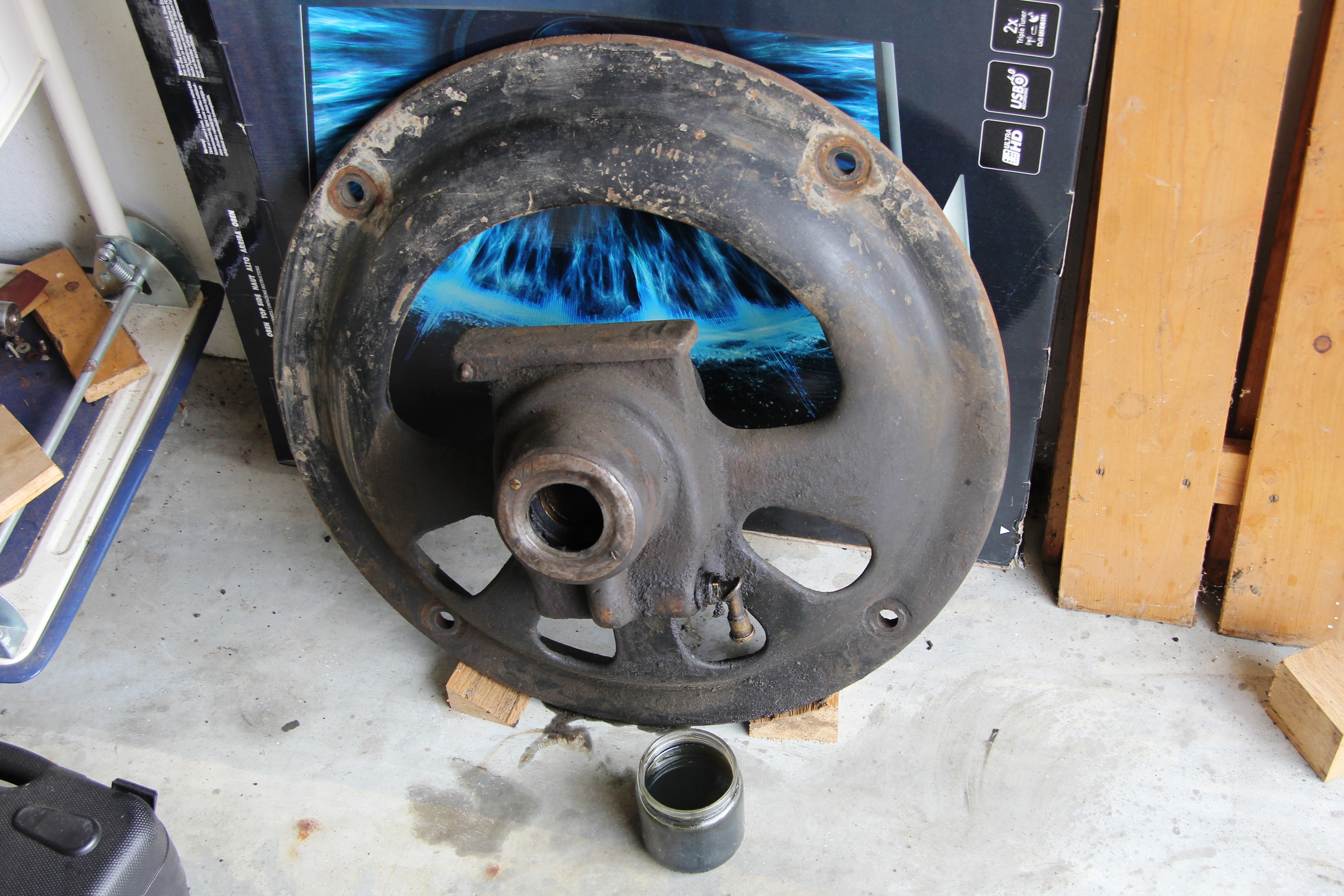 Lagerschild eines historischen 20-PS Schleifringläufers der Siemens-Schuckert-Werke mit Gleitlager (50 mm Wellendurchmesser). Durchmesser des gesamten Teils: 60 cm, etwa 50 kg schwer.